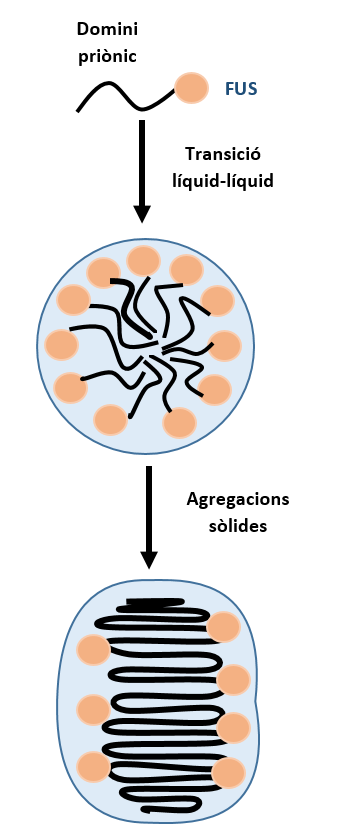 En aquesta fotografia es pot observar com les proteïnes del FUS estableixen la conformació de gota líquida i com posteriorment, degut a diverses mutacions, aquestes proteïnes formen una mena d'agregacions fibrilars